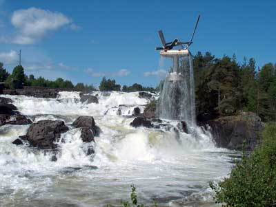 Hønefossen ved Hønefoss i Ringerike kommune Fotograf: Tom Bjørnstad, 2000